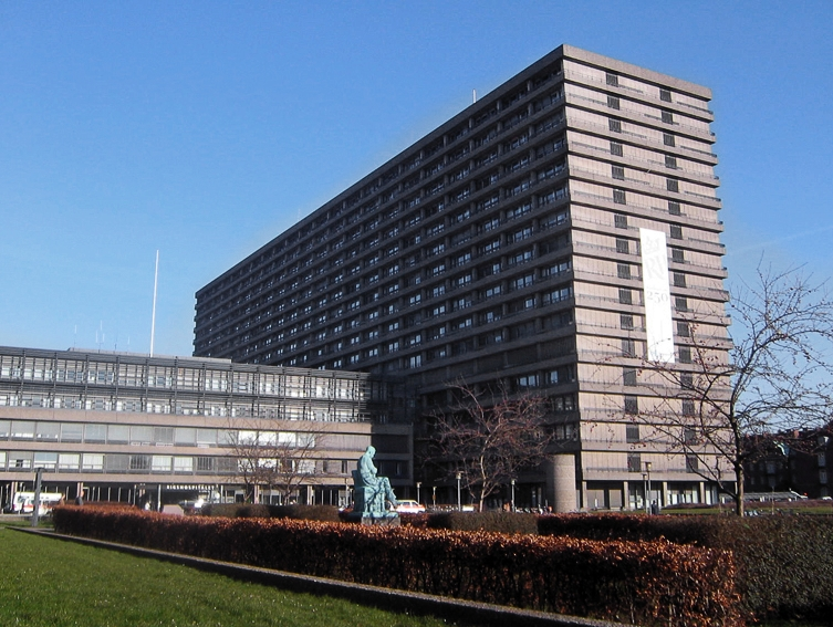 Rigshospitalets hovedbygning set fra Blegdamsvej